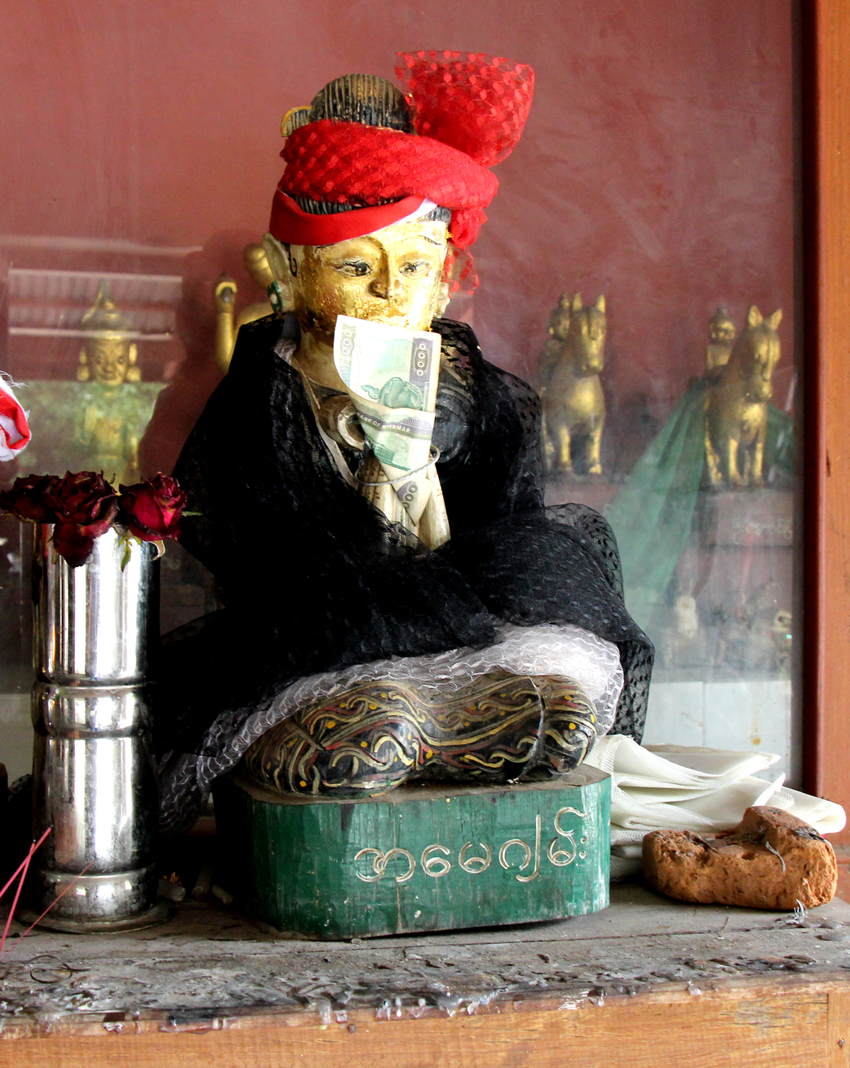 မြန်မာဘာသာ: အမေဂျမ်းနတ် (ပုဂံရှိ ရွှေစည်းခုံဘုရားအတွင်းမှ)